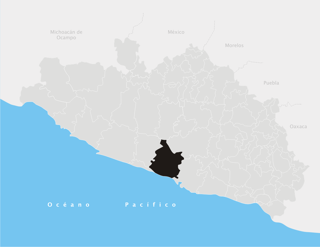 Coyuca de Benítez en el estado de Guerrero (México)